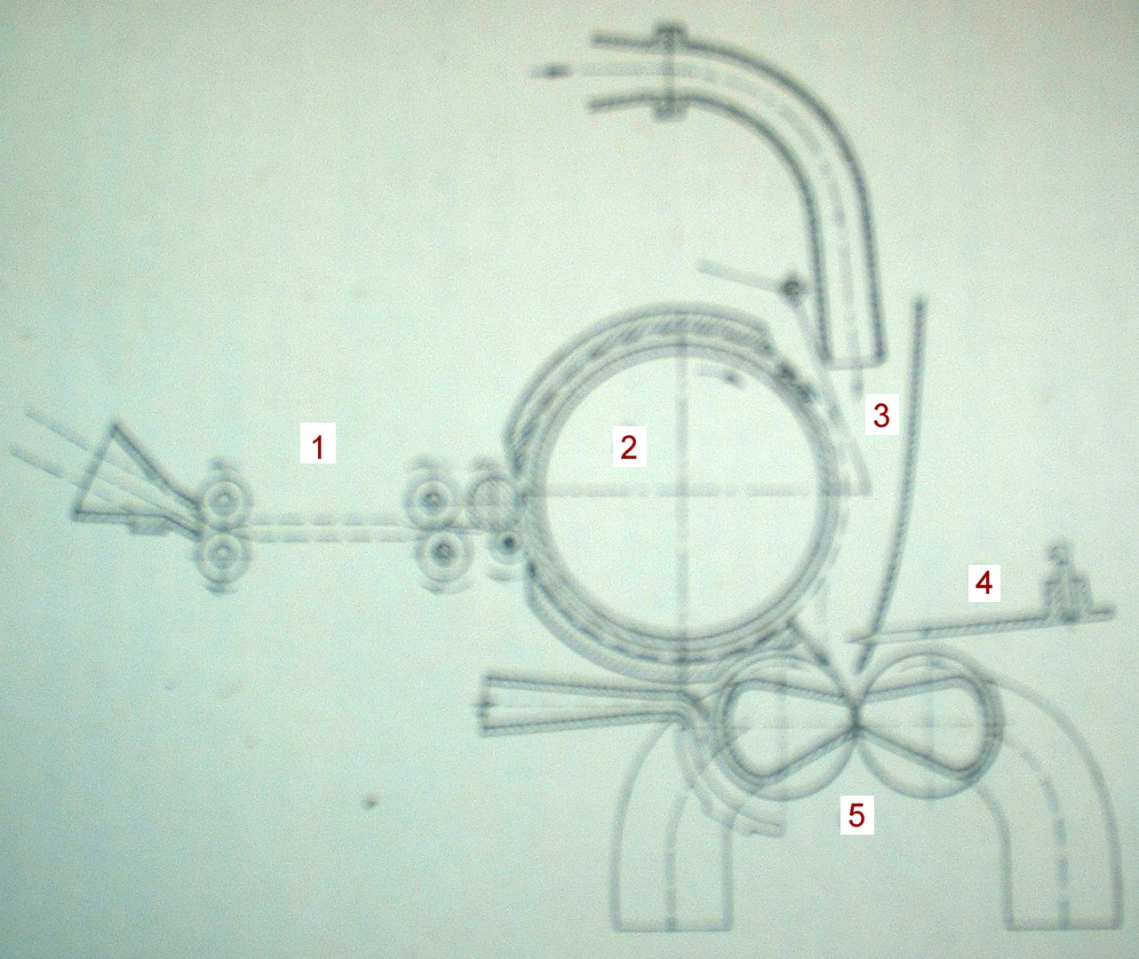 Schema:Friktionsspinnen